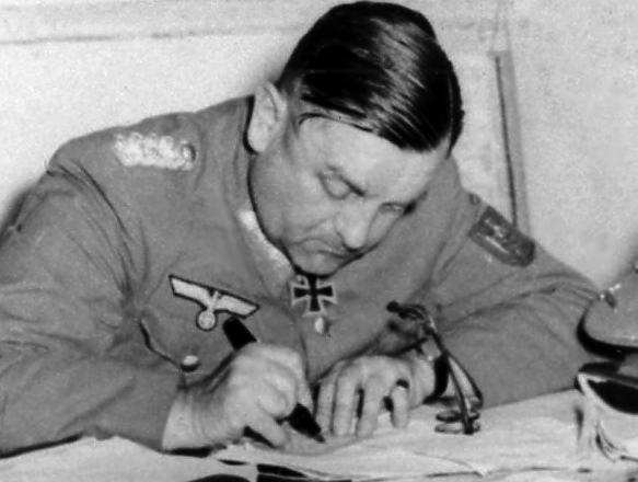 25. August 1944 - Unterzeichnung der Kapitulationsurkunde im Gare de Montparnasse in Paris - gemeinsam mit Général Leclerc (französische Armee) und dem Kommunisten Henri Tanguy, (Kriegsname des Führers der Pariser Resistance/FFI: Colonel Rol).